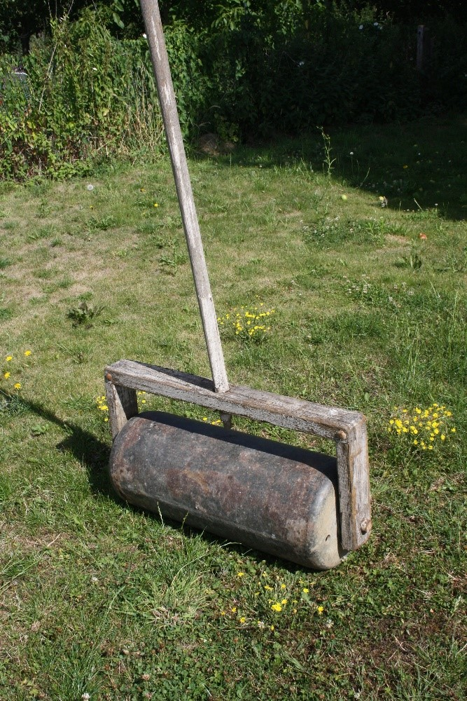 Gebruik van een rol (onderdeel ijzeren muur) na de oorlog als landbouwwerktuig